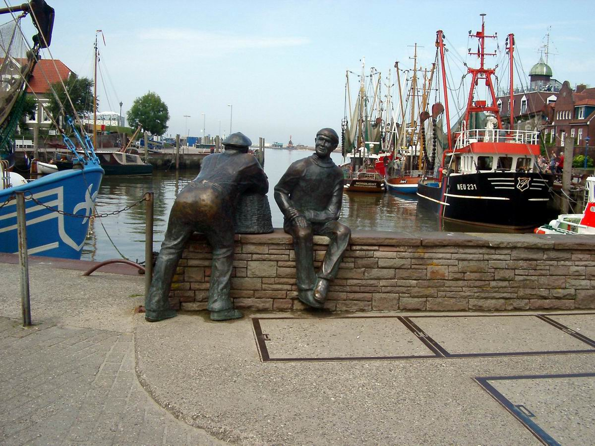 Neuharlingersiel-Hafen